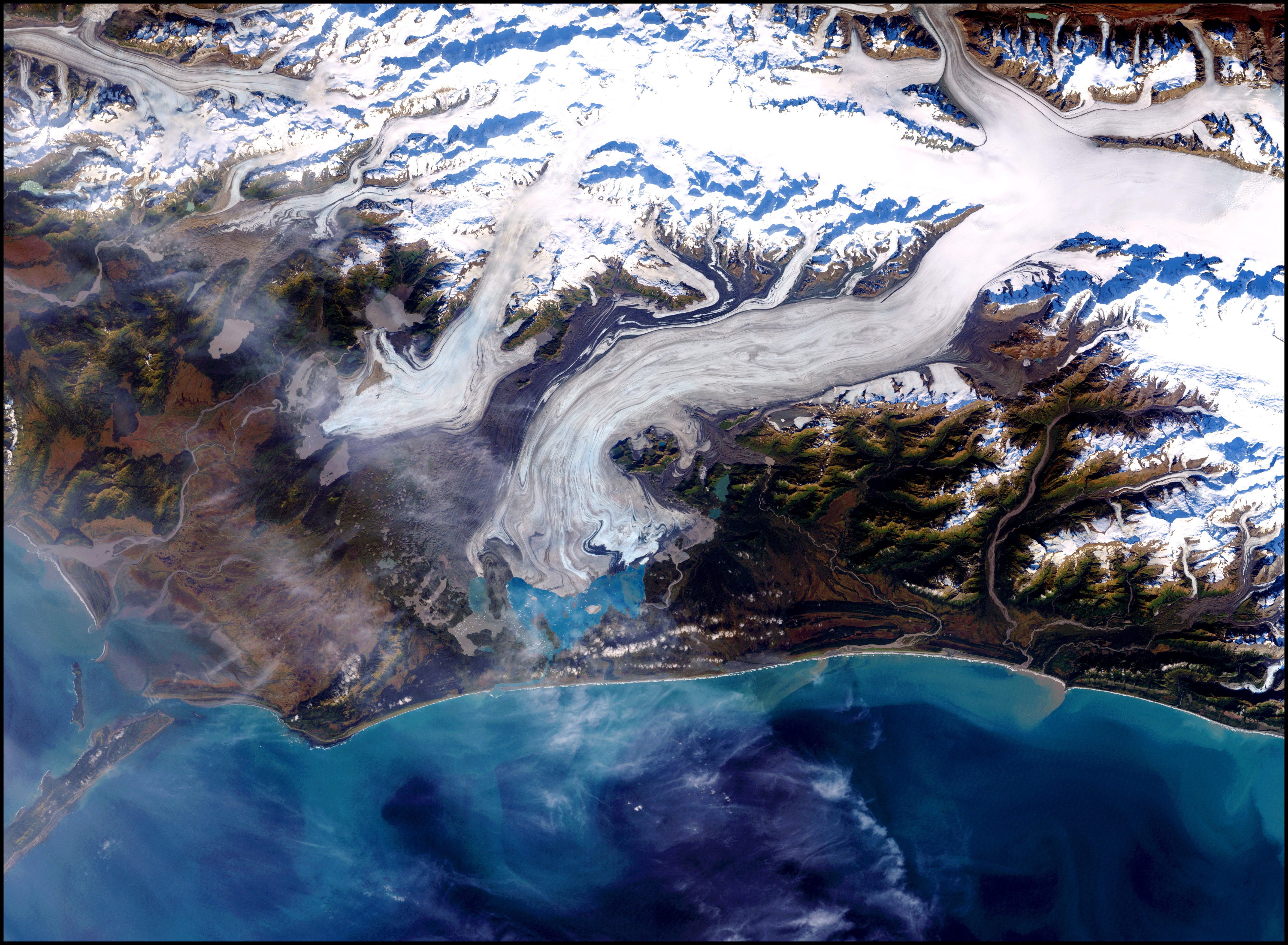 Bering Glacier currently terminates in Vitus Lake south of Alaska’s Wrangell-St. Elias National Park, about 10 km from the Gulf of Alaska.